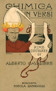 Copertina "Chimica in versi (Rime distillate)" di Alberto Cavaliere